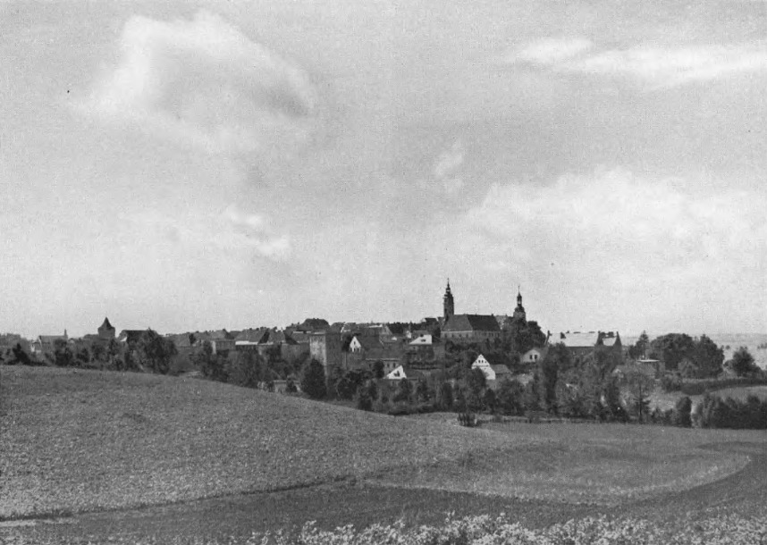 Panorama Białej